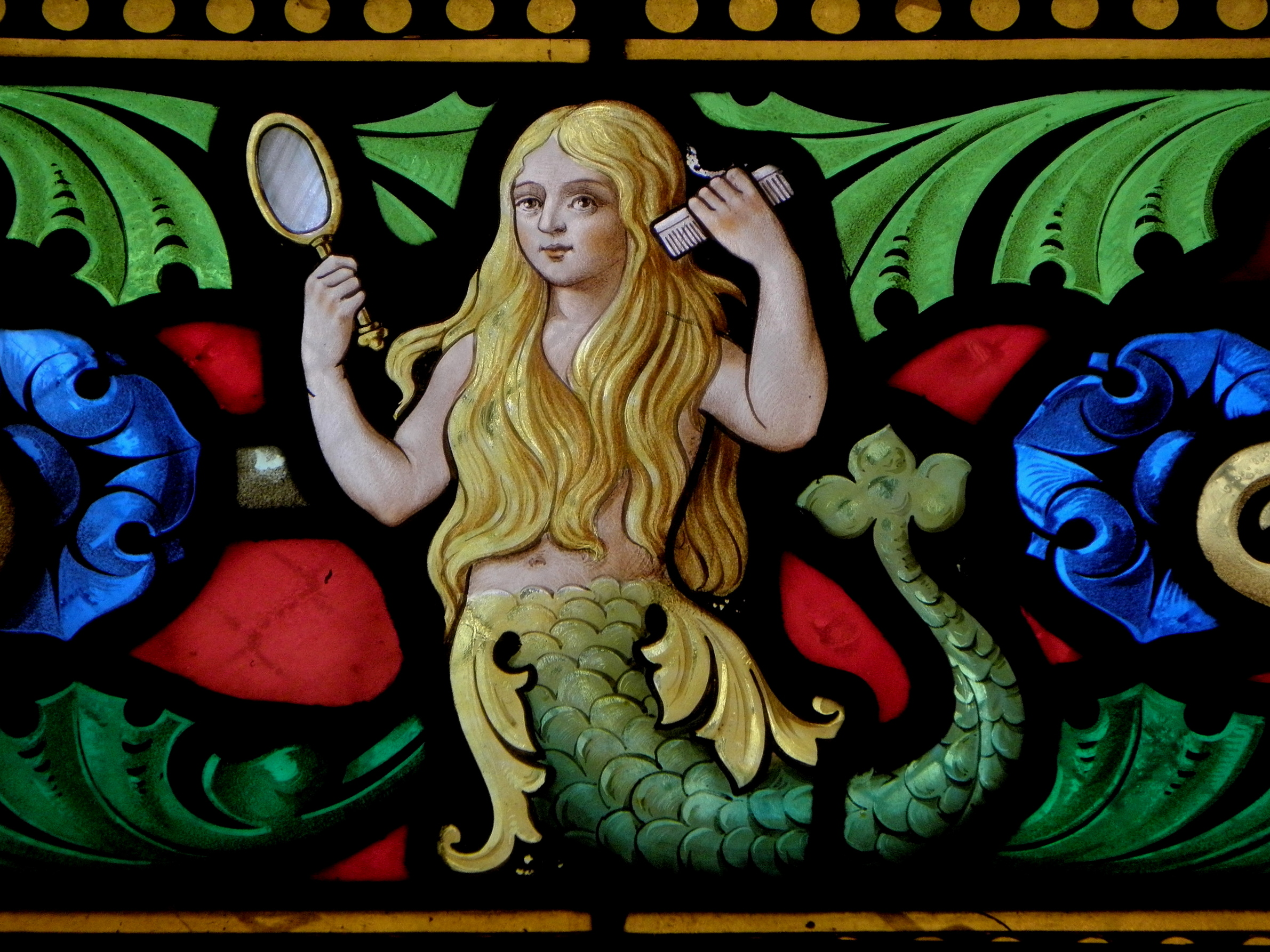 Bordure de la baie 06 de l'église saint-Sulpice de Fougères (35). Détail. Mélusine.